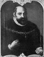 Albert V (Bavaria)